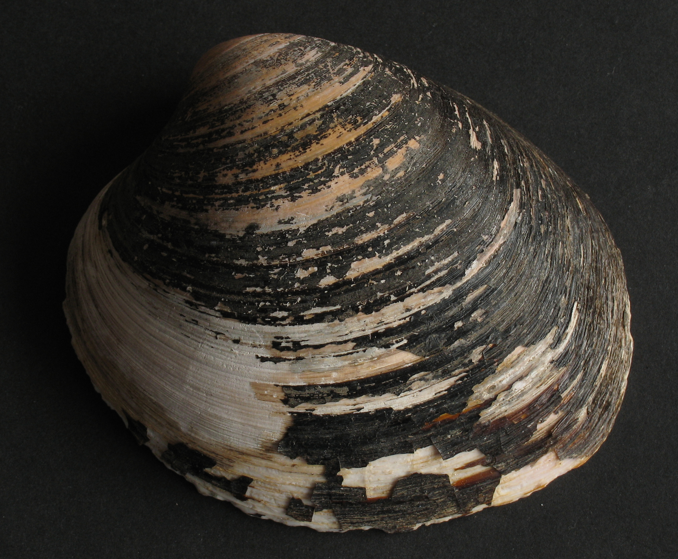 Arctica islandica - Islandmuschel